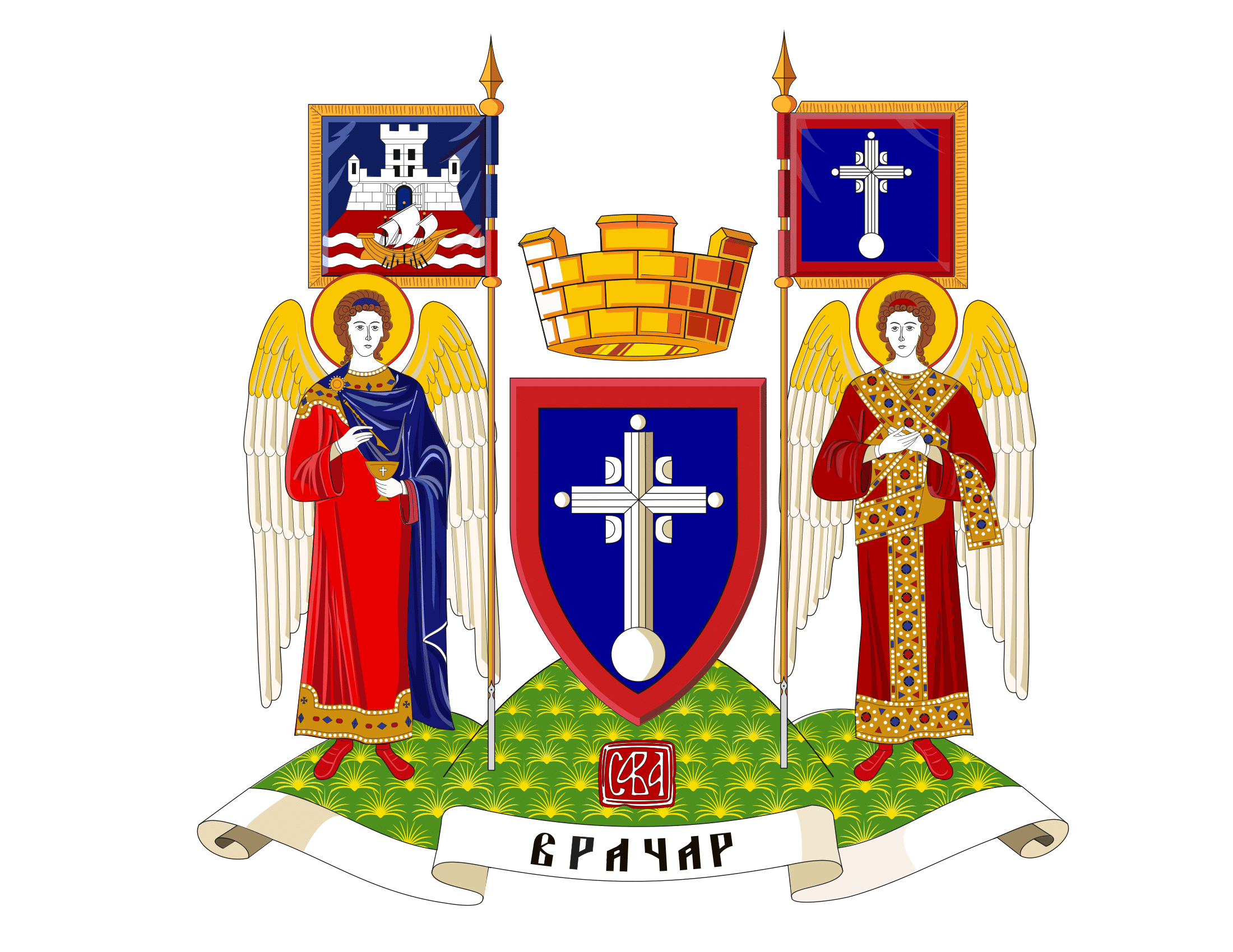 2019. је дошло до промене званичног грба Општине Врачар